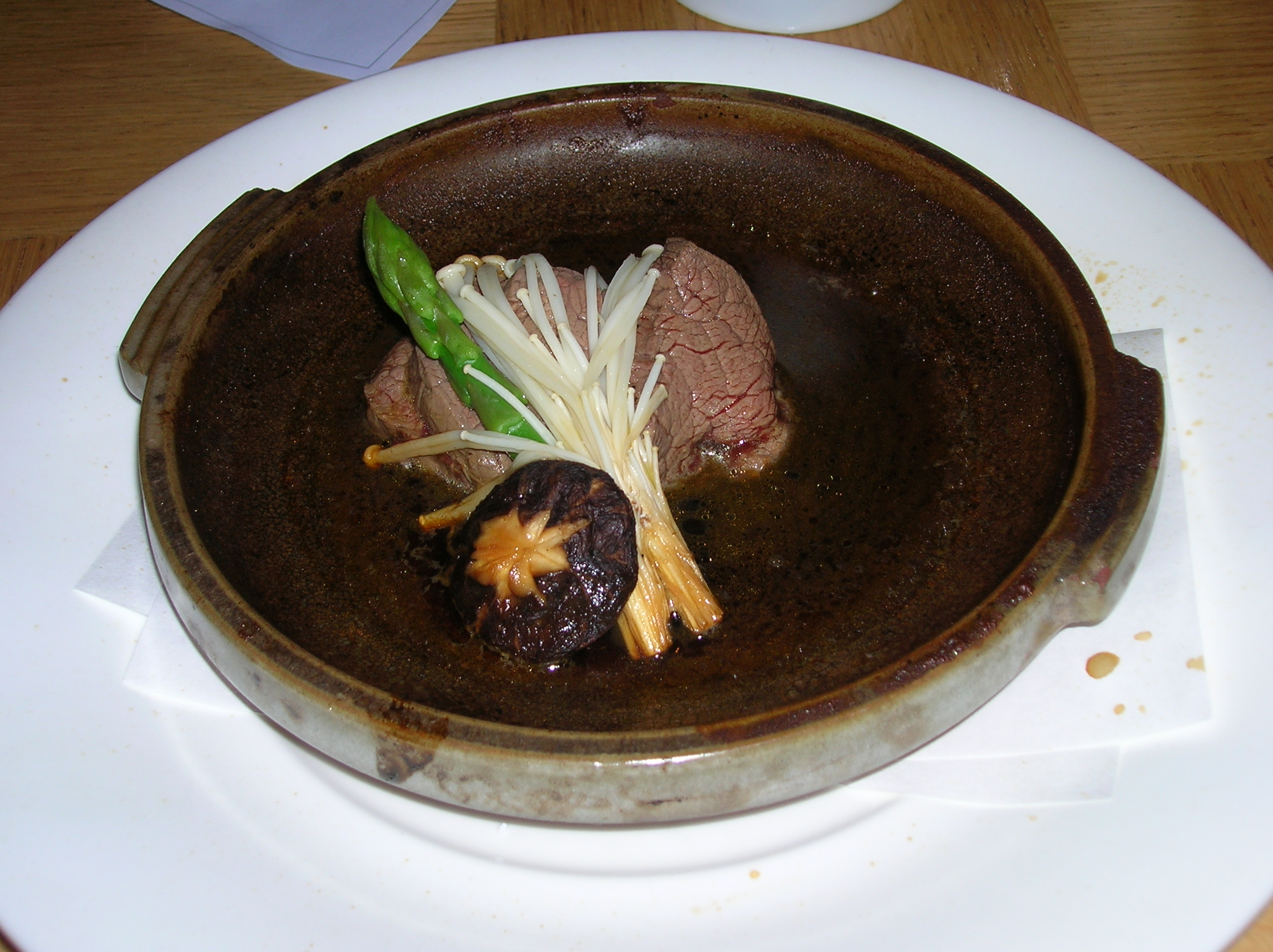 בקר טובן יאקי